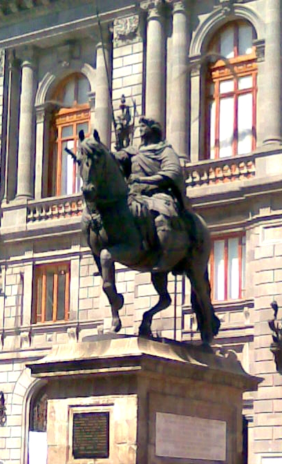 Estatua ecuestre de Carlos IV. Ciudad de México. Artista: Manuel Tolsá.